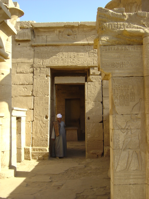 Eigen foto januari 2007 Karnak Ben Pirard